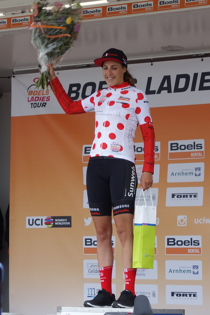 Lucinda Brand kreeg de bolletjestrui na de proloog op het Tom Dumoulin Bike Park in Sittard in de Boels Ladies Tour 2019